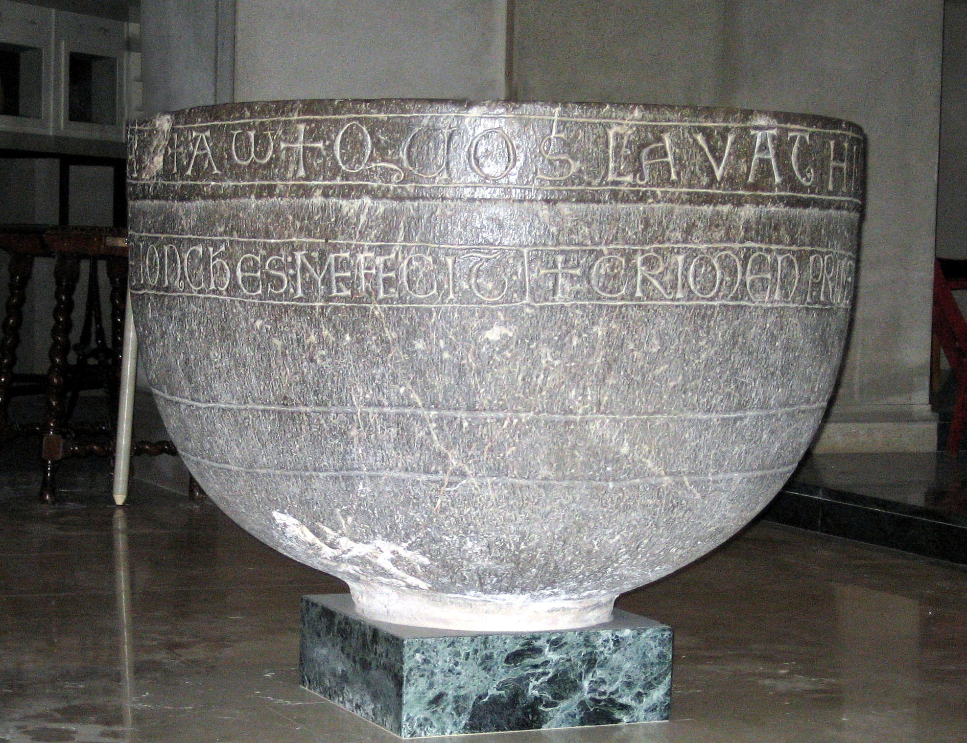 Pila bautismal románica en la iglesia de Sant Martí en Peralada, Cataluña, España